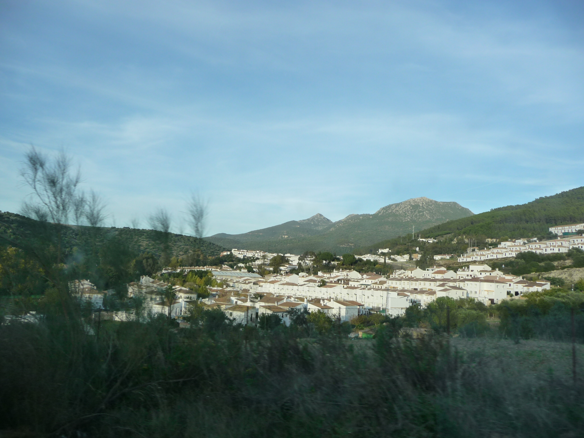 ElBosque-P1050286.JPG